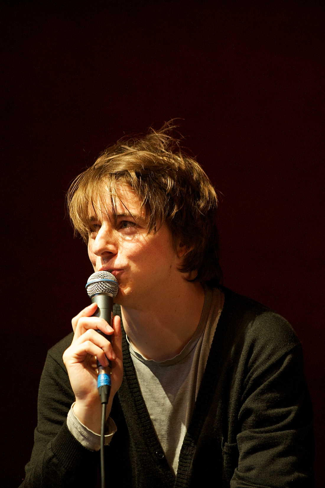 Michael Wollny bei einem Konzert von [em] (Würzburger Hafensommer, 08.08.2010)